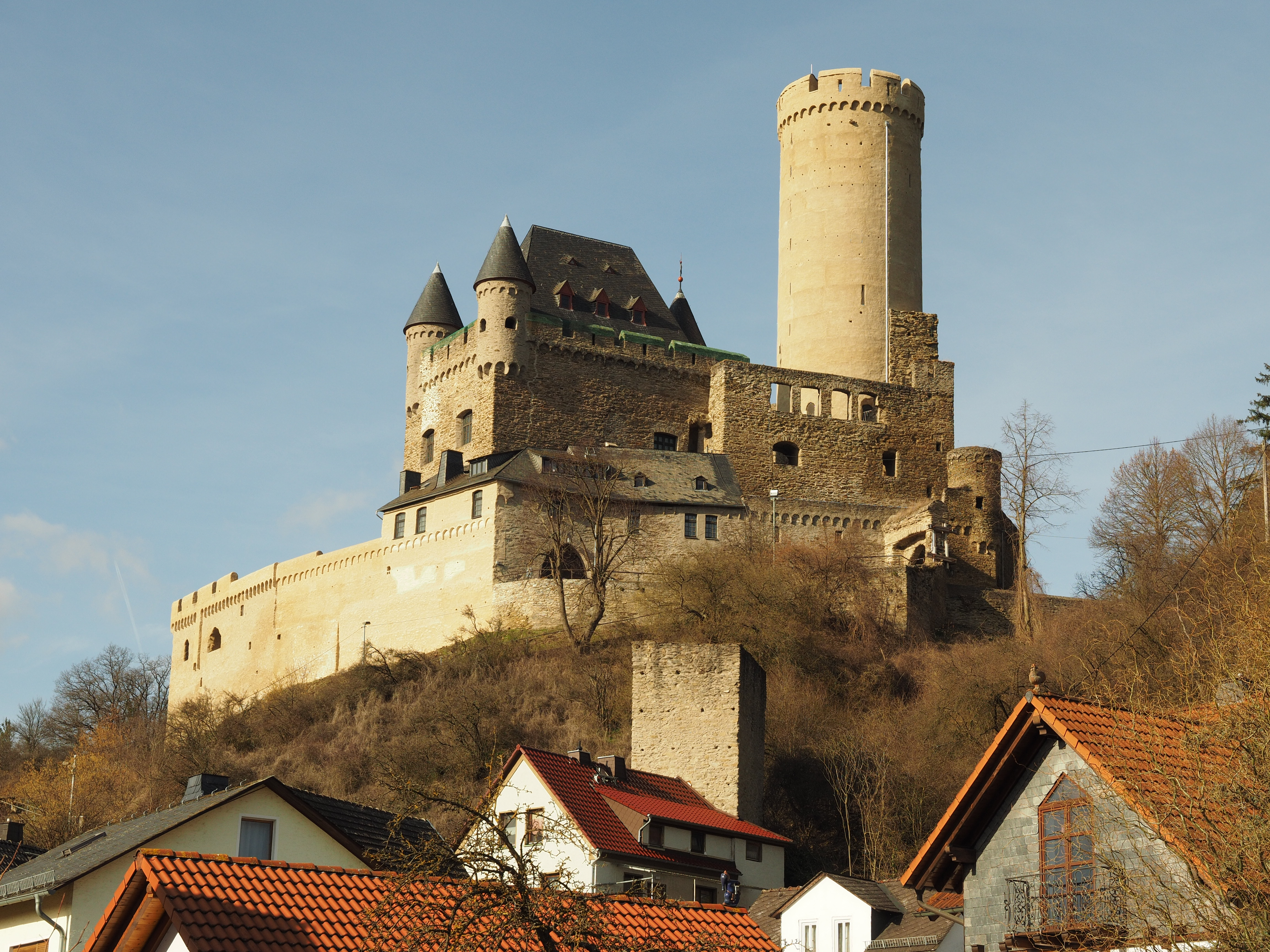 Burg Schwalbach über dem Ort Burgschwalbach, Aufnahme von Südosten